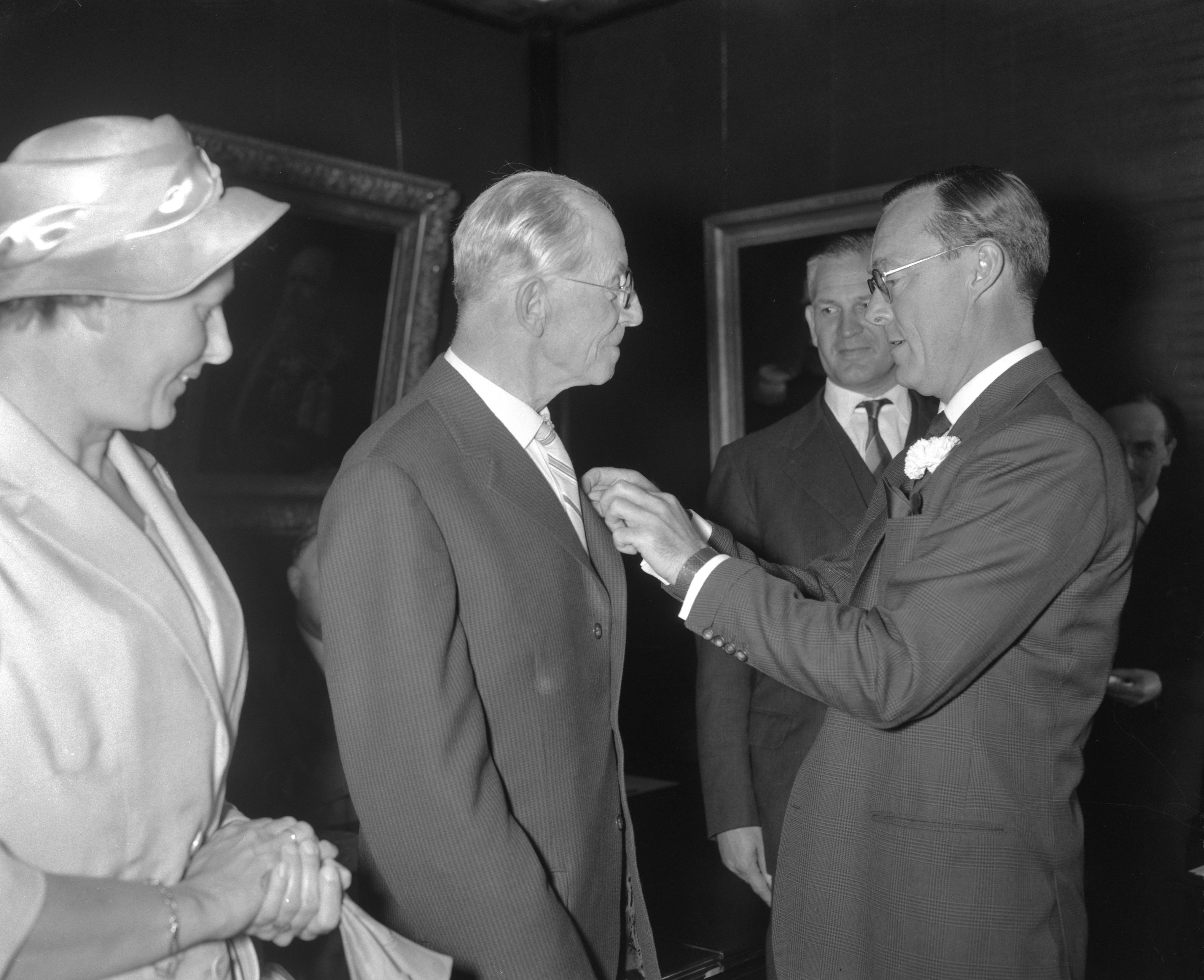 Collectie / Archief : Fotocollectie Anefo Reportage / Serie : [ onbekend ] Beschrijving : Uitreiking Zilveren Anjer Datum : 14 juli 1960 Trefwoorden : Uitreikingen Instellingsnaam : Zilveren Anjer Fotograaf : Bilsen, Joop van / Anefo Auteursrechthebbende : Nationaal Archief Materiaalsoort : Negatief (zwart/wit) Nummer archiefinventaris : bekijk toegang 2.24.01.04 Bestanddeelnummer : 911-4214